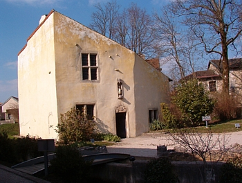 Maison natale de Jeanne d'Arc (© Francis MONTIGNON) GFDL Francis MONTIGNON